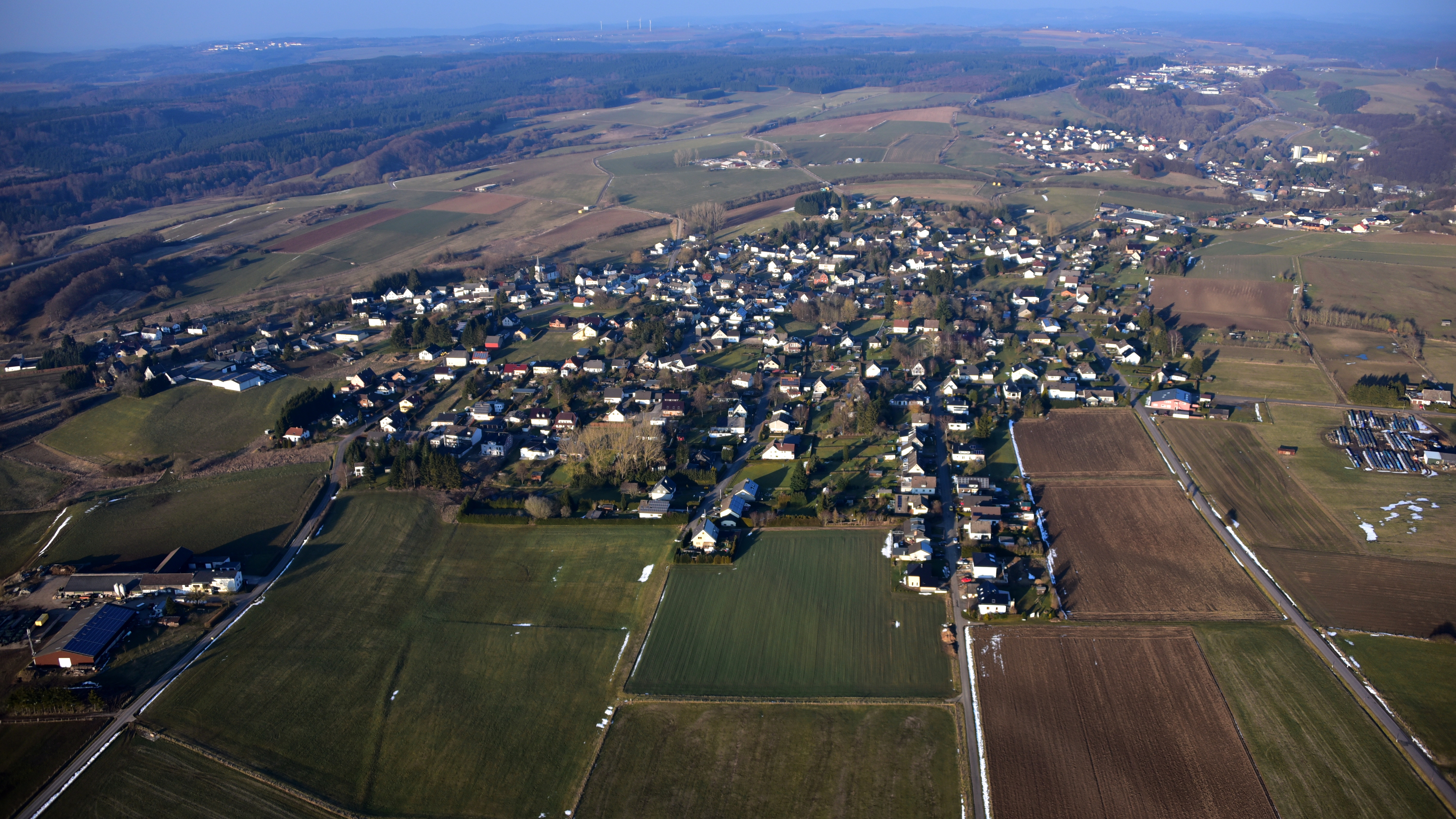 Blankenheimerdorf, Luftaufnahme (2016)